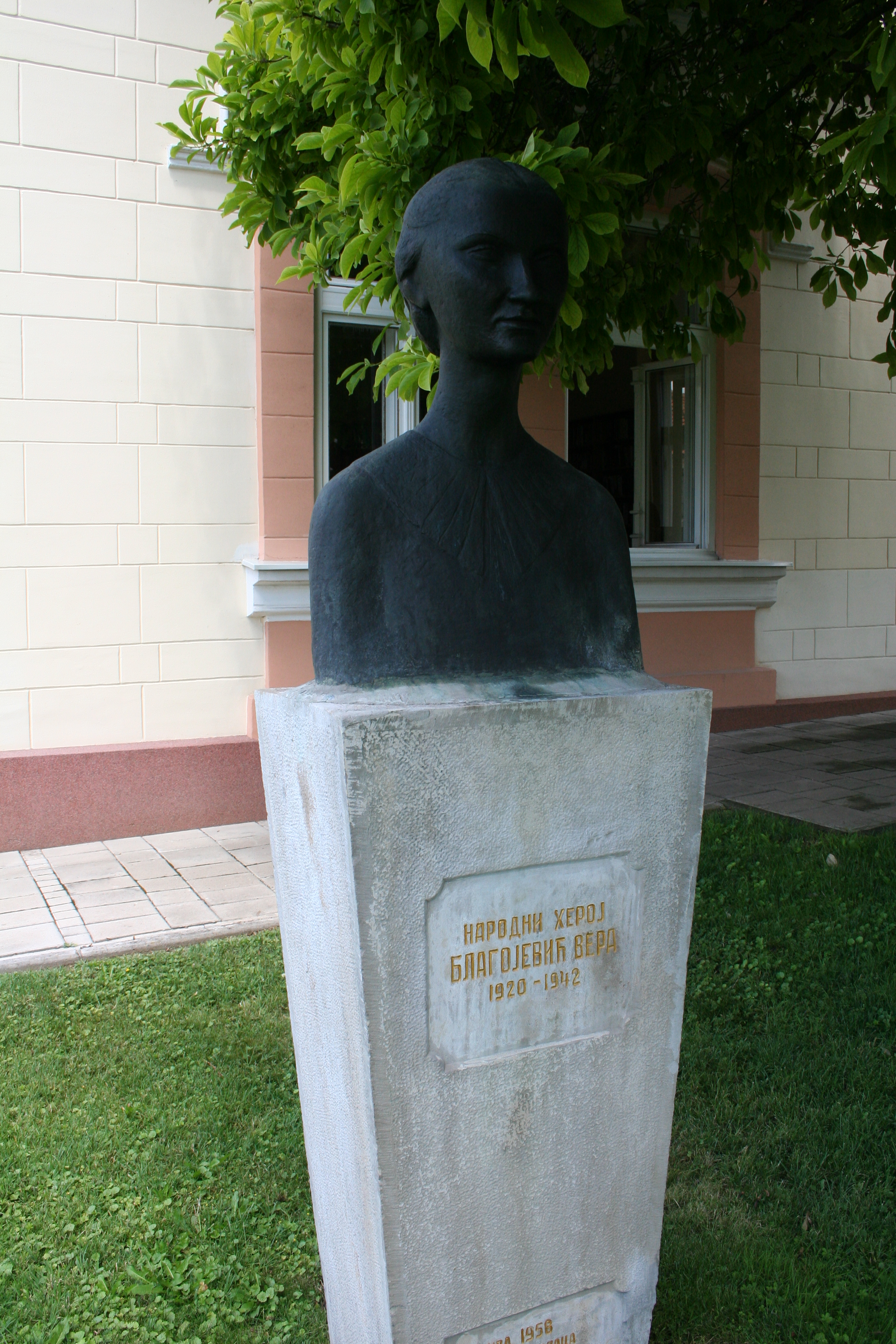 Spomenik Veri Blagojević, narodnom heroju, u dvorištu biblioteke